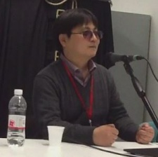 Sakae Esuno en una entrevista.